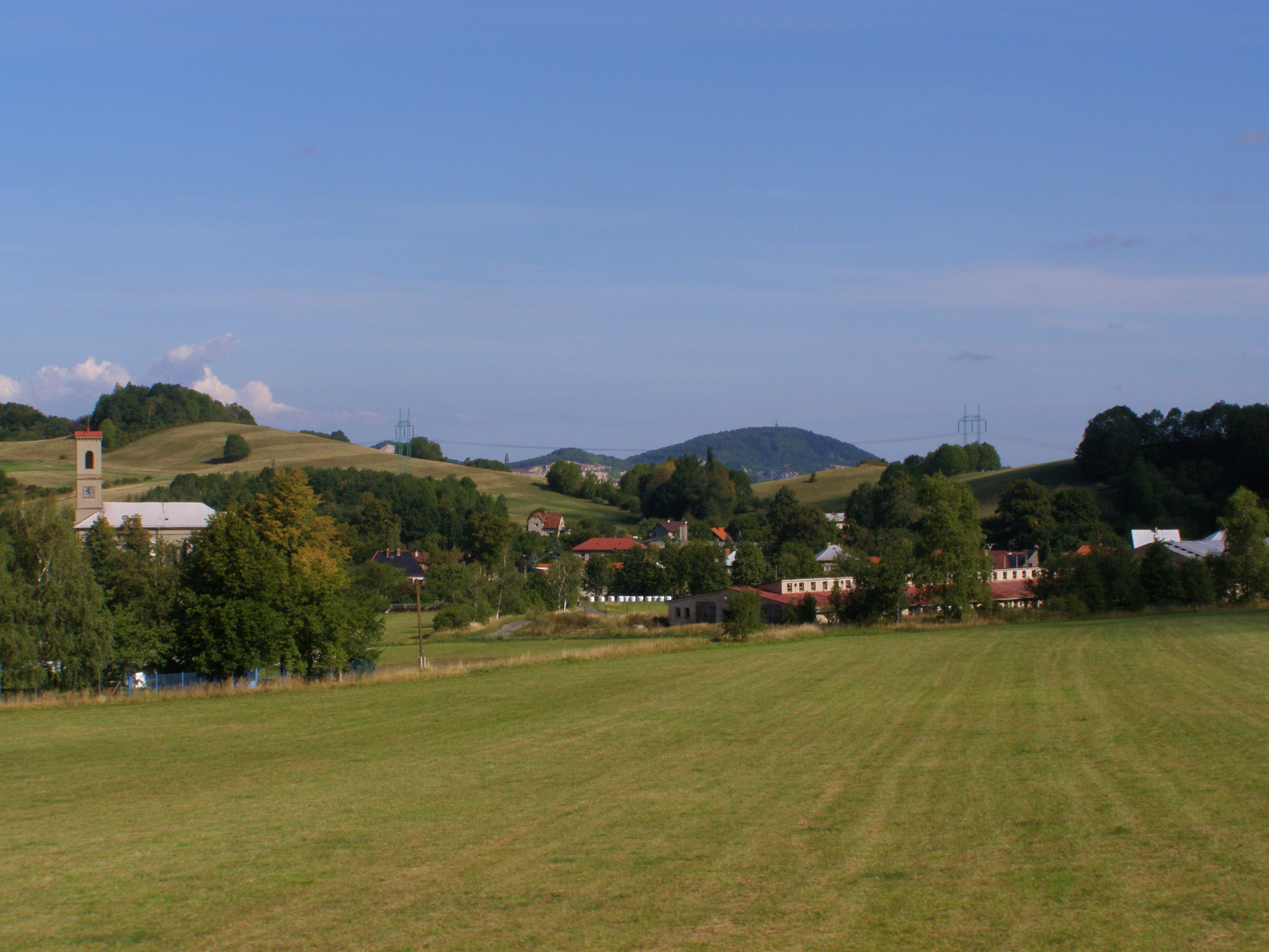 Veřovice, Libotínské vrchy, zcela vzadu Šostýnské vrchy (vrch Kotouč)